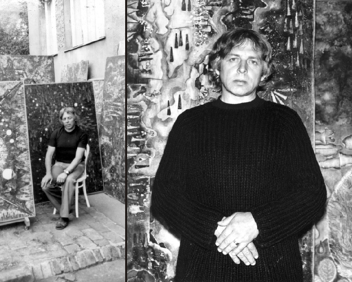 Vilem_Kocych_malir